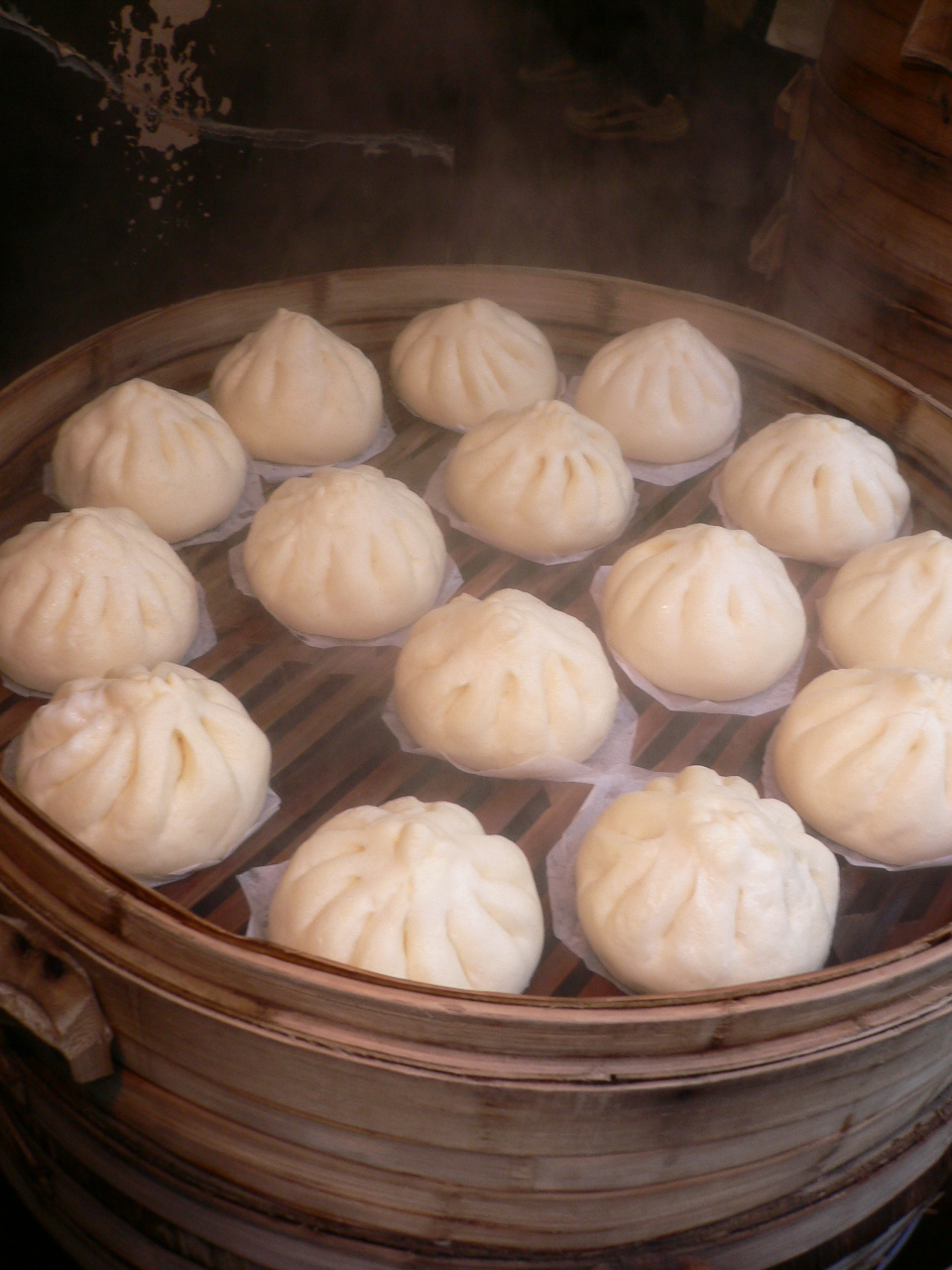 Nikuman, japanese snack food